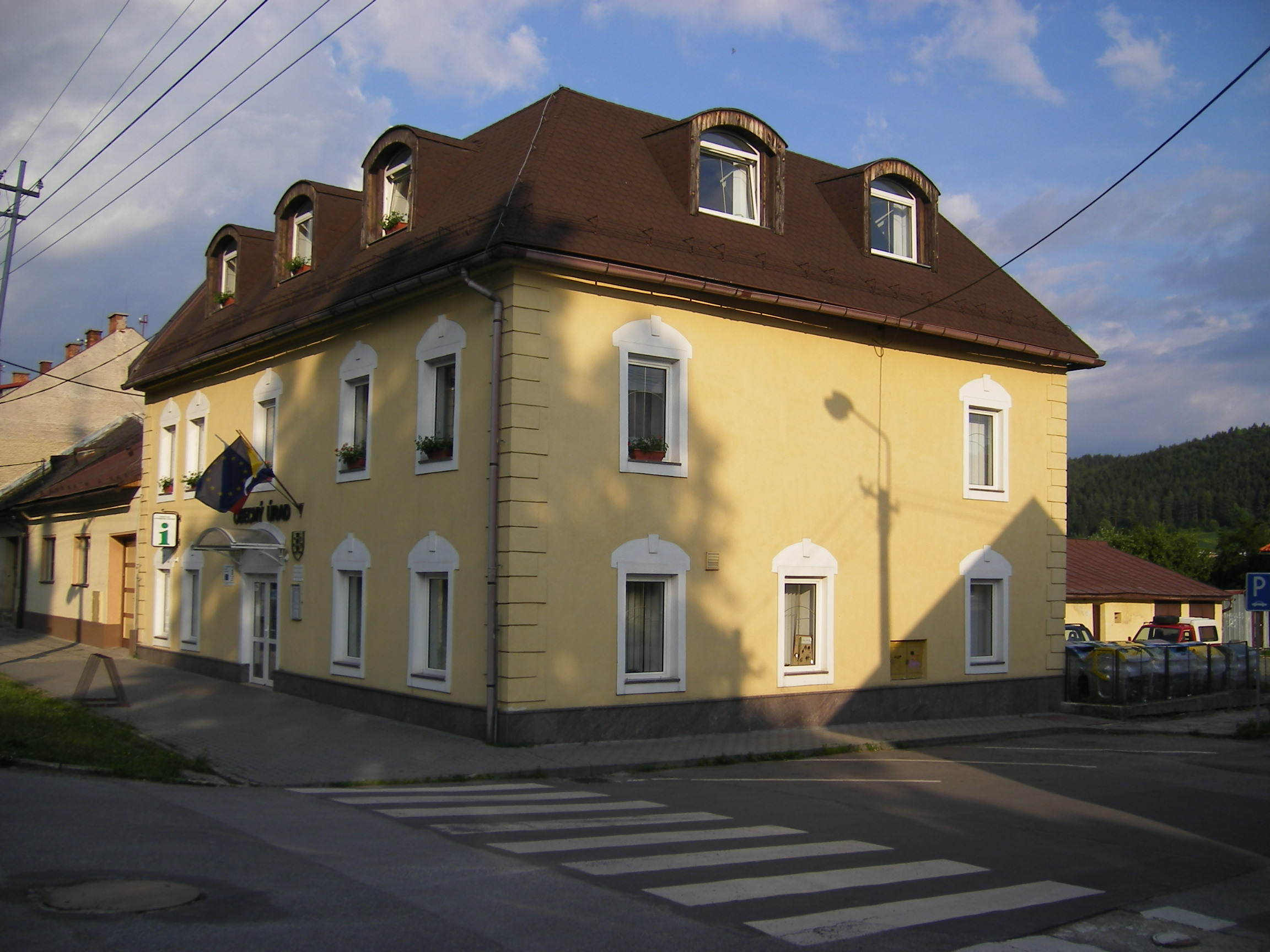 Slovenská Ľupča (BB), municipal building